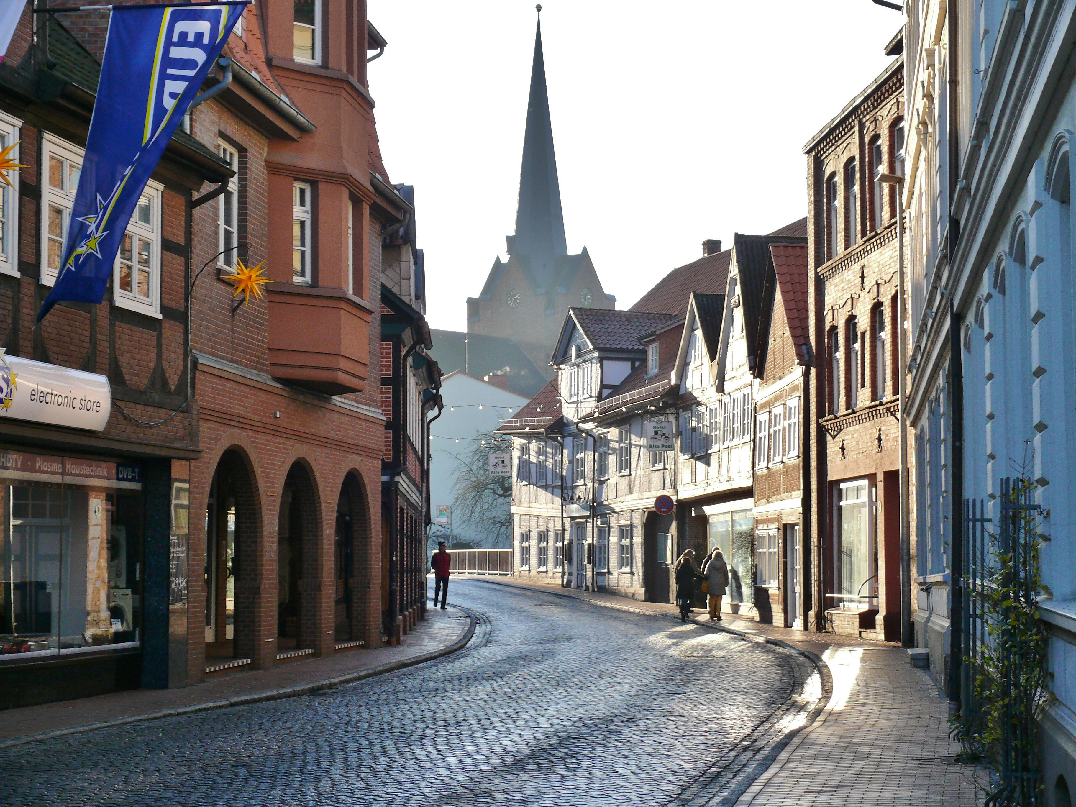 Die Marschtorstraße in Dannenberg (Elbe). Im Hintergrund die Kirche Sankt Johannis.